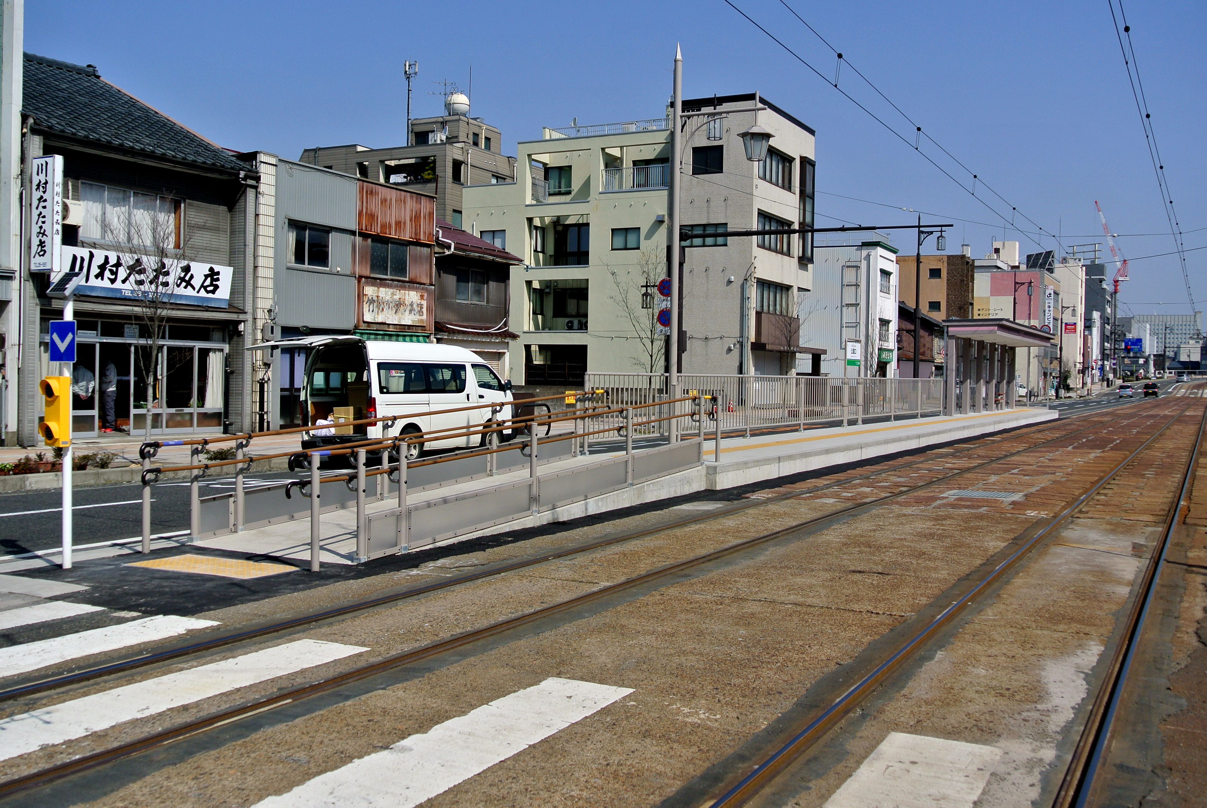 福井鉄道福武線公園口駅